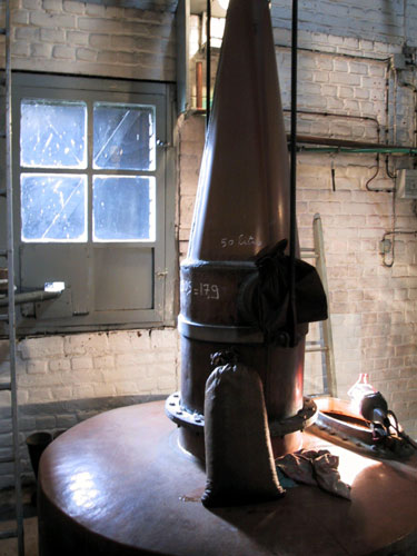 Un alembic de genièvre